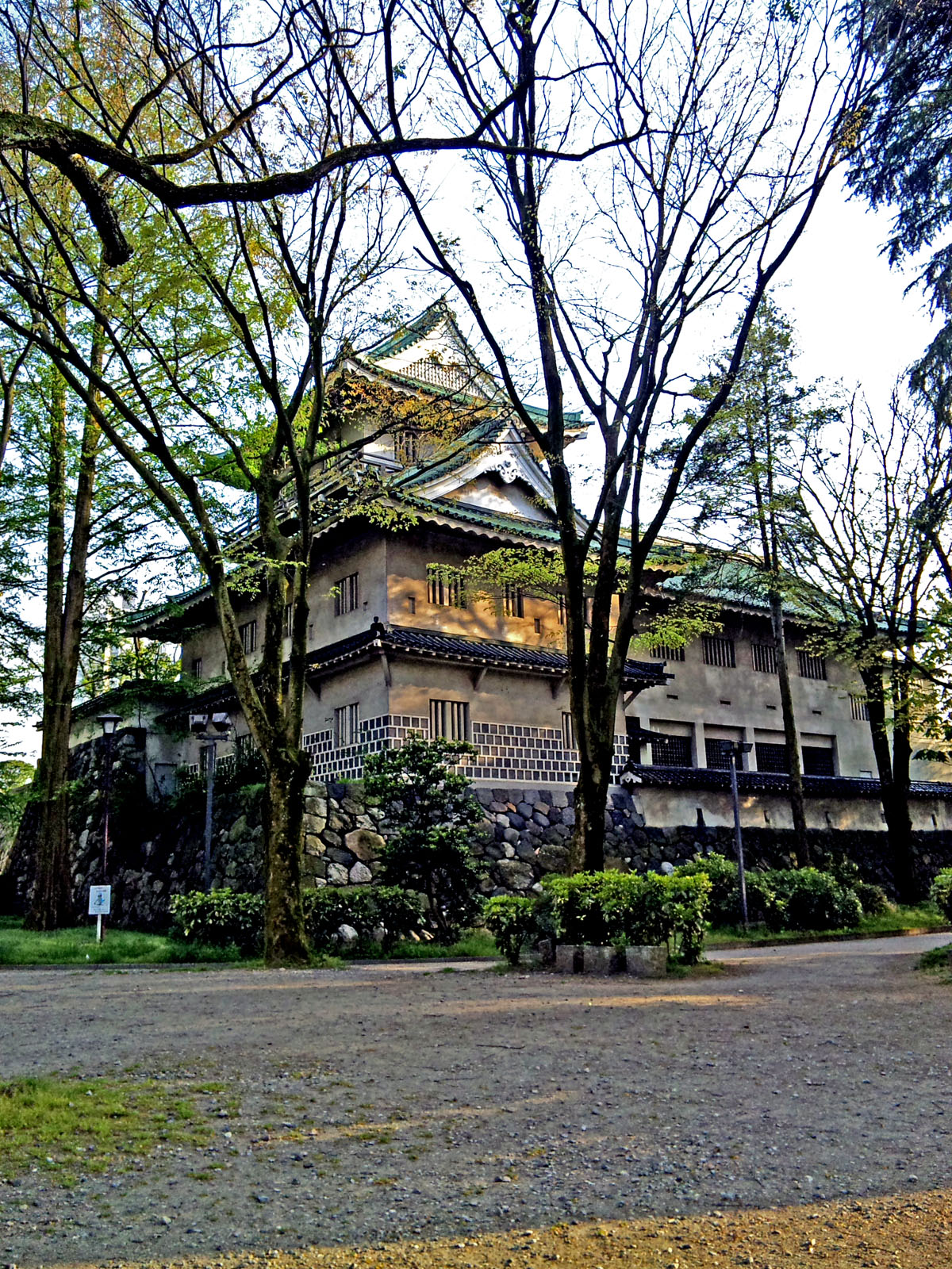 美術館 museum